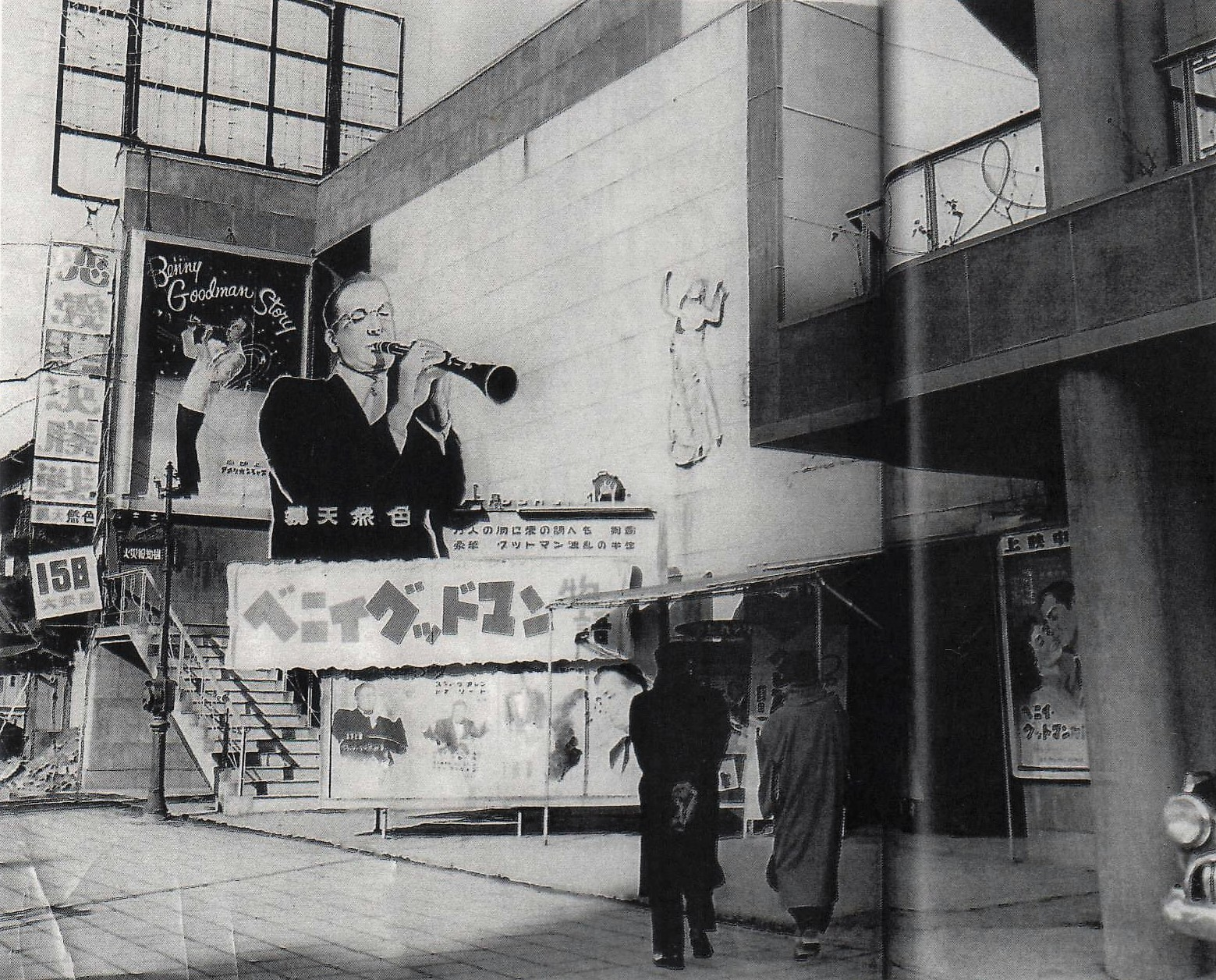 名古屋市中区栄にあった丸栄ピカデリー劇場。